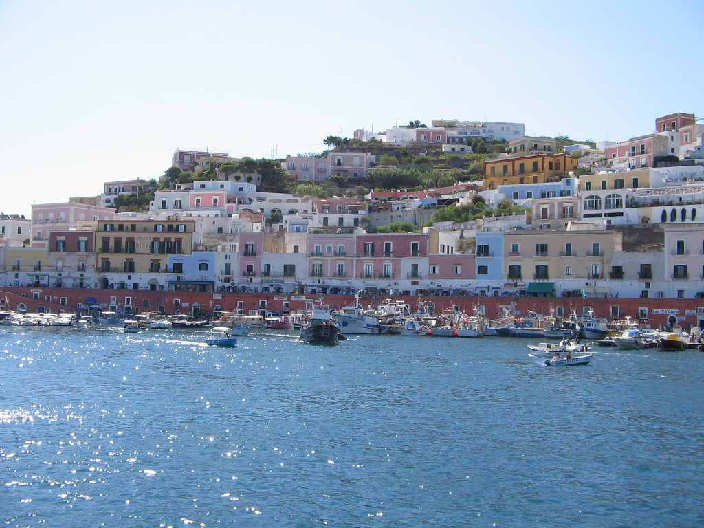 Ponza, Lazio, Italia